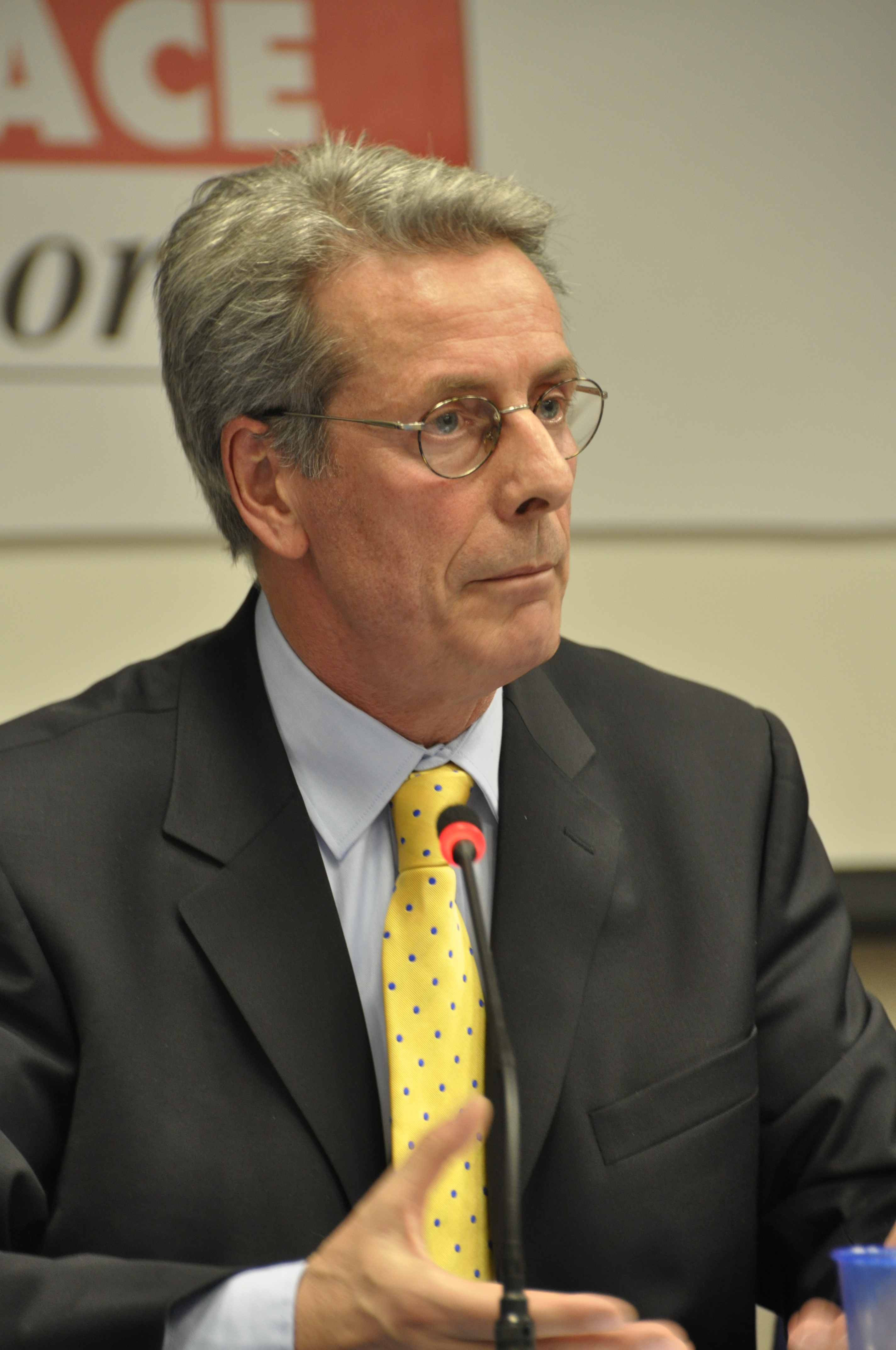 Jacques Cordonnier, président du parti régionaliste Alsace d'abord, conseiller régional d'Alsace (1992-2004), conseiller municipal de Strasbourg (1989-1995)